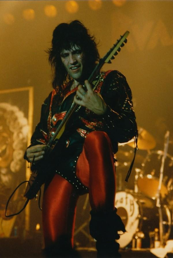 Бывший гитарист Running Wild